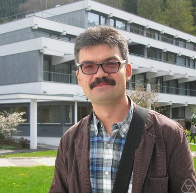 Foto di Wadim Zudilin